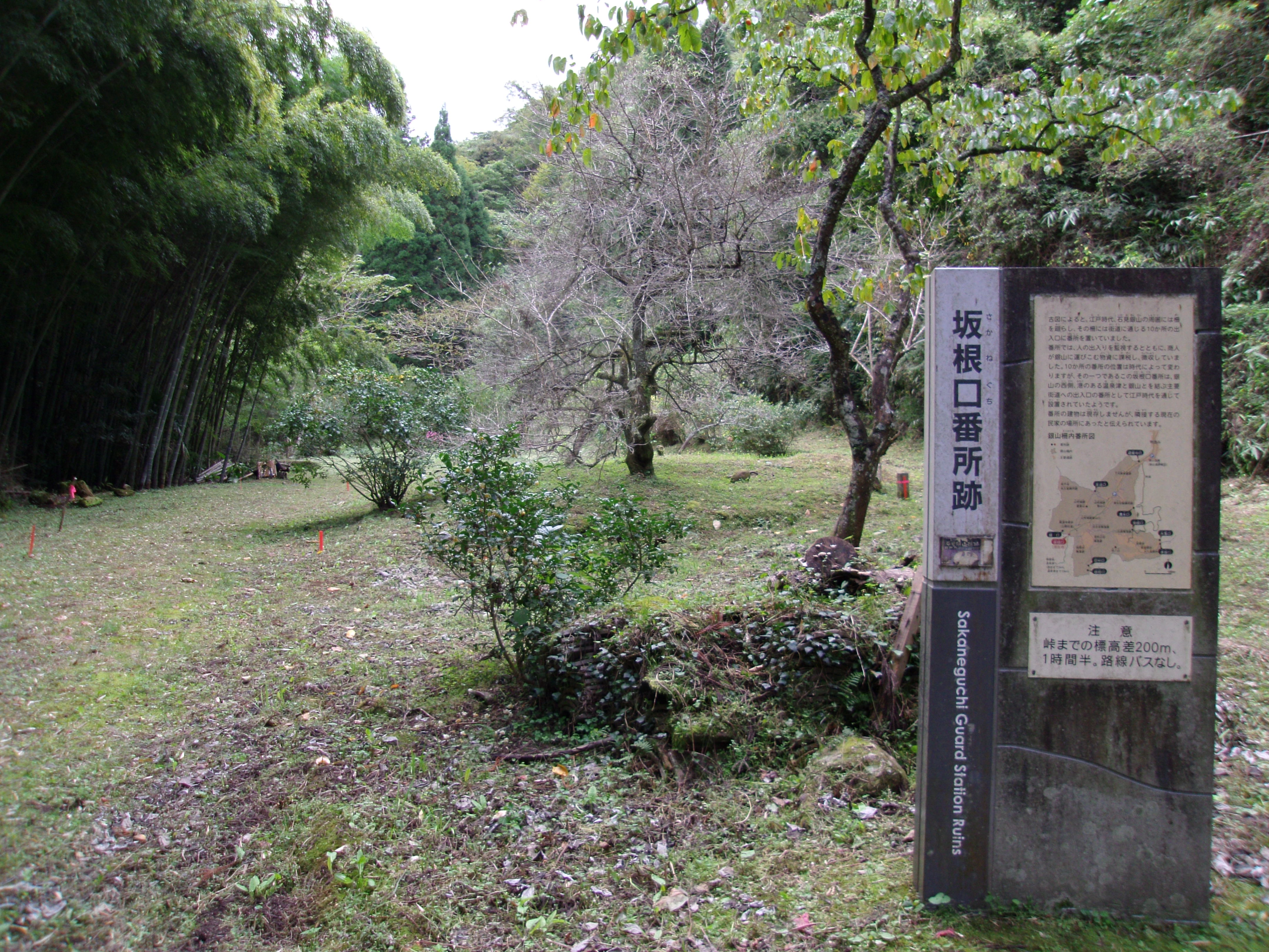 世界遺産「石見銀山」の構成資産である銀山街道温泉津沖泊道 大森側の起点となる坂根口番所跡